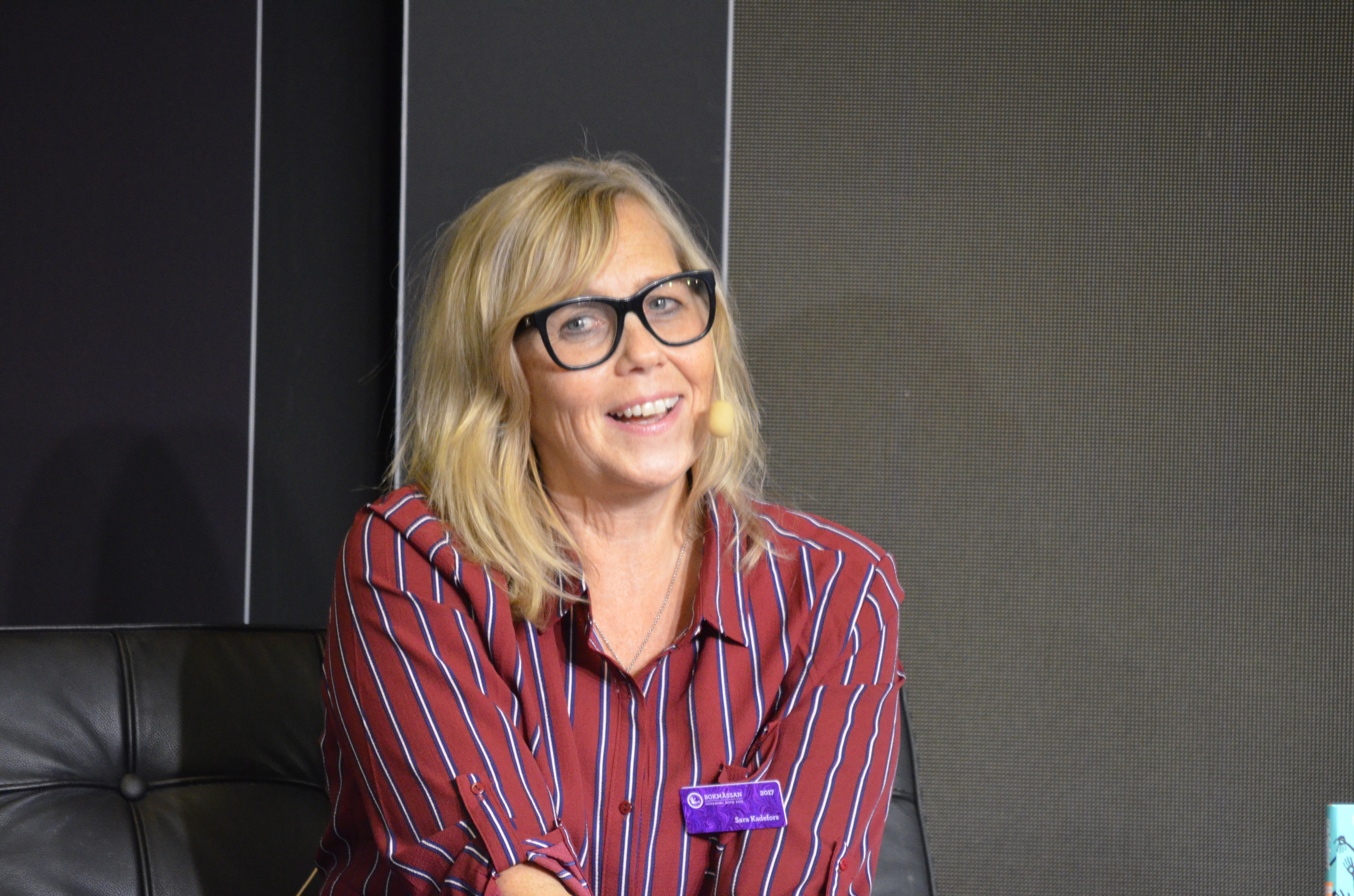 Sara Kadefors Bokmässan Göteborg 2017